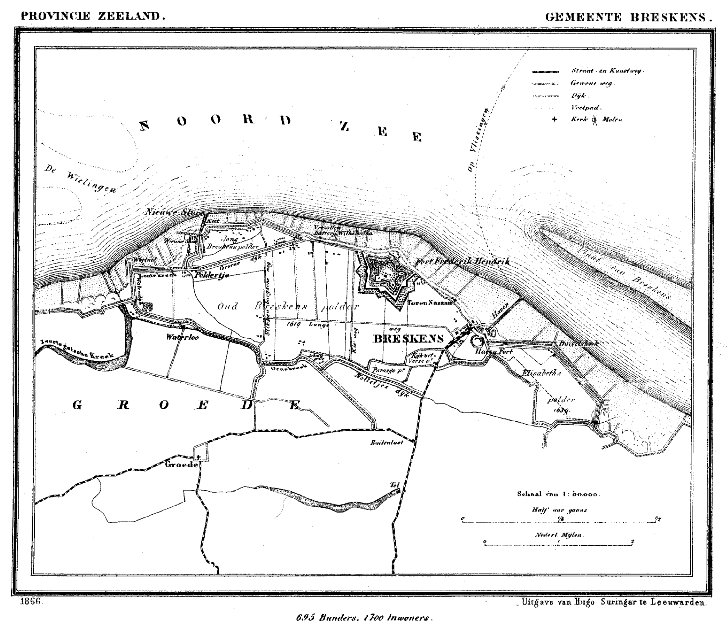 Gemeente Breskens, Zeeland, Nederland